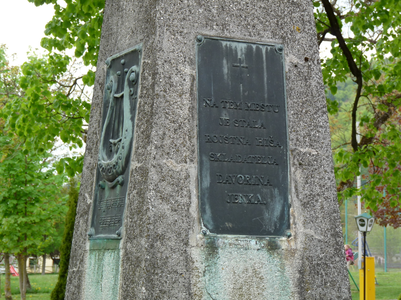 Plošča na kraju rojstne hiše Davorina Jenka v Cerkljah na Gorenjskem